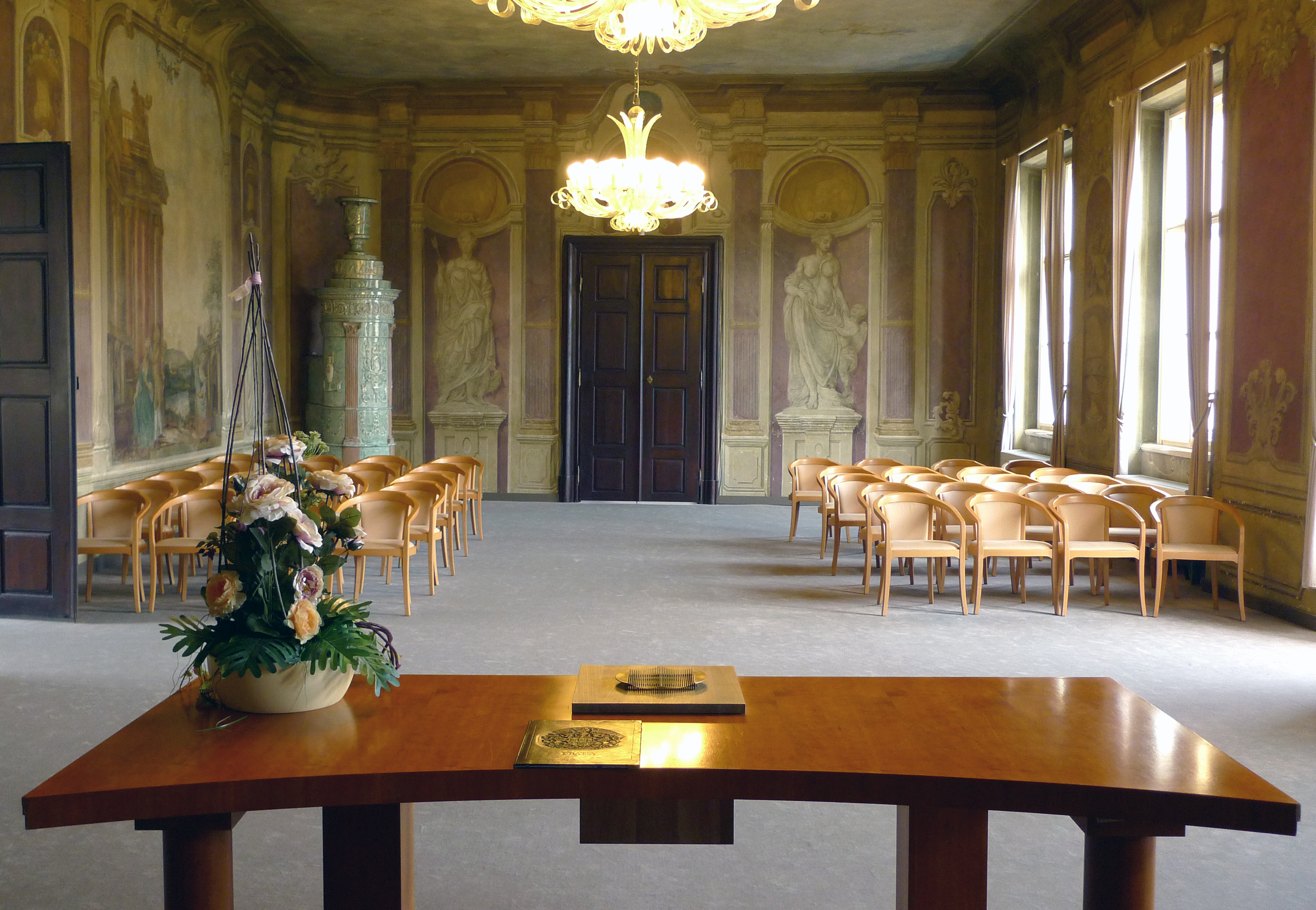 Libeňský zámeček v Praze 8 – svatební místnost